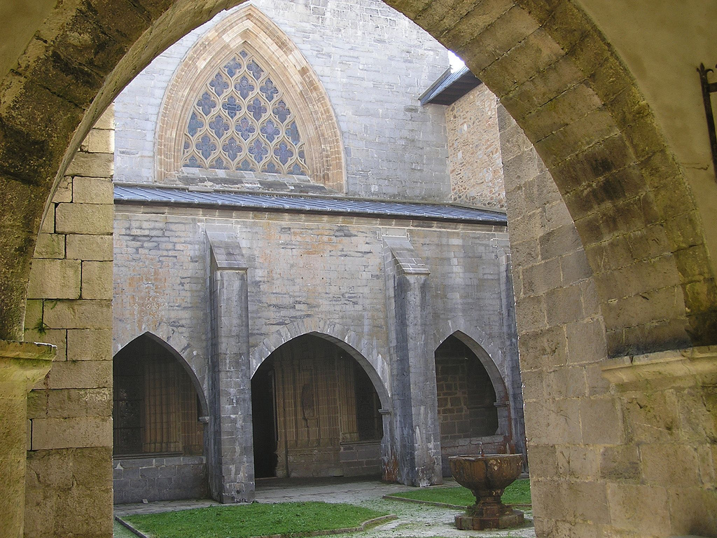 Claustro Roncesvalles, Navarra